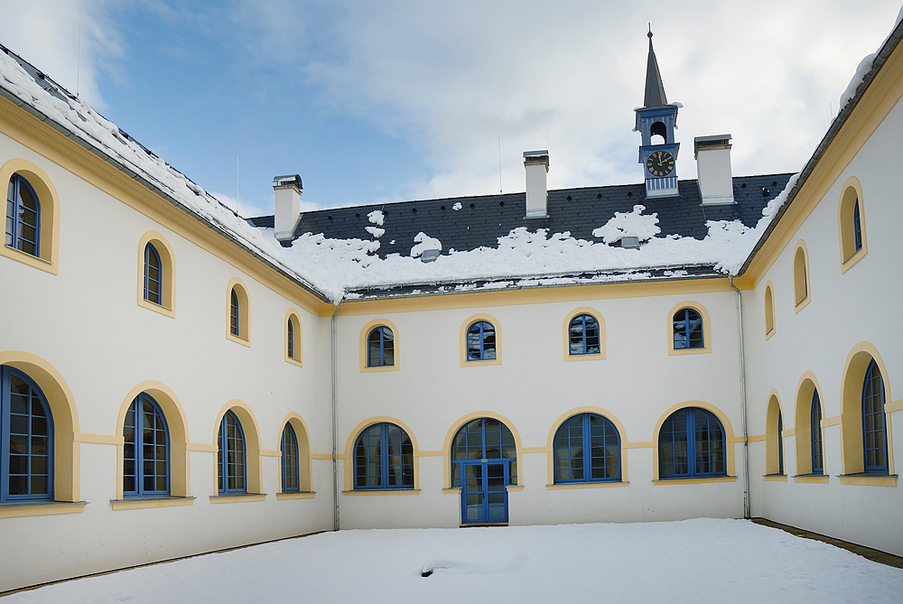 Rekonstruovaný františkánský klášter v Hostinném